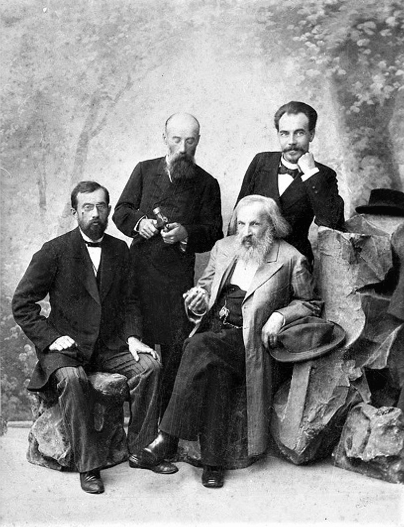 Уральская экспедиция Д. И. Менделеева: слева-направо стоят: младший инспектор Главной палаты мер и весов Константин Николаевич Егоров и профессор Пётр Андреевич Земятченский; сидят: химики Семён Петрович Вуколов и Дмитрий Иванович Менделеев